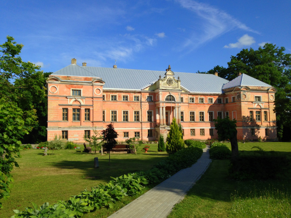 June 2013. Beautiful Latvia